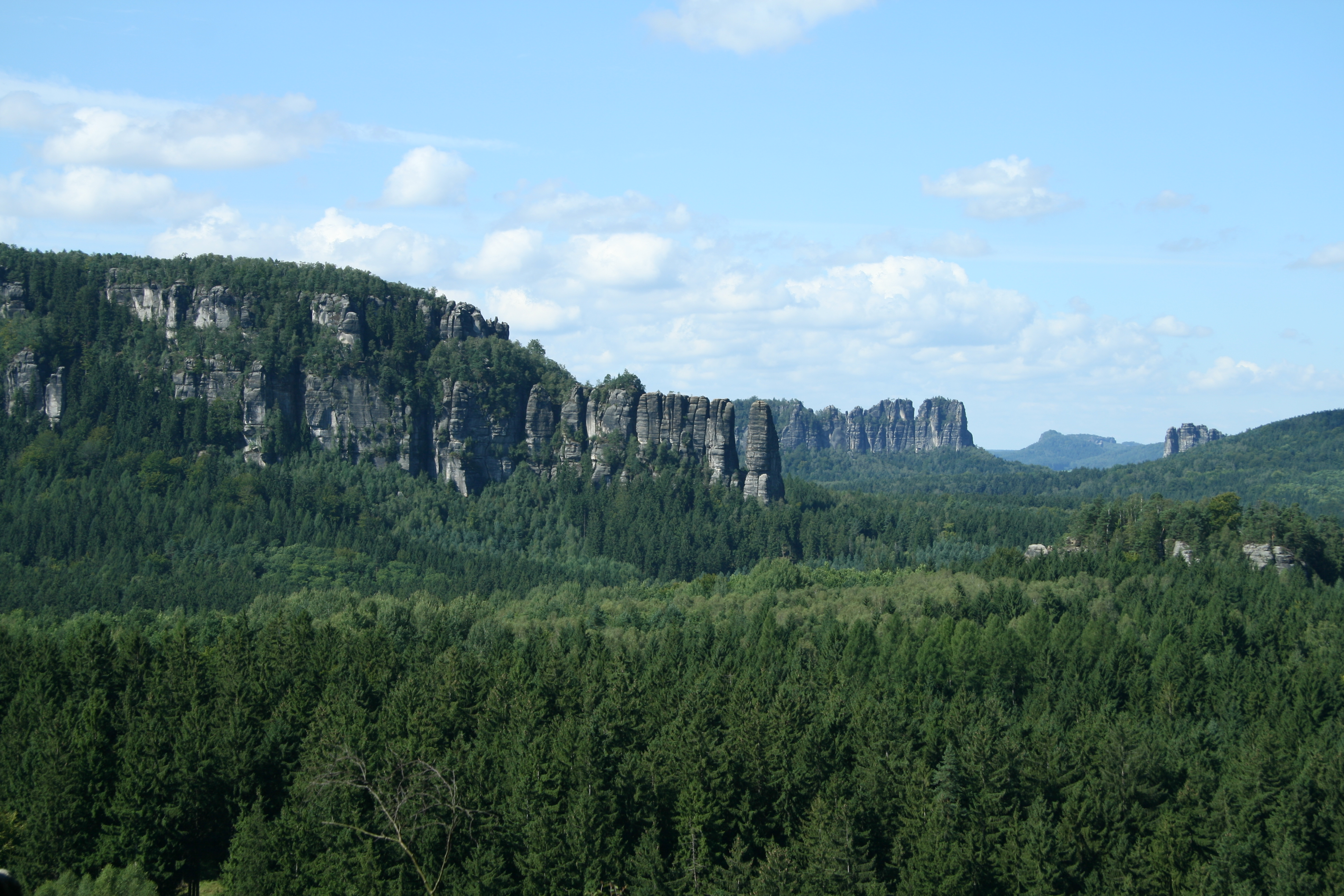 Der Bloßstock in den Affensteinen mit den Schrammsteinen im Hintergrund